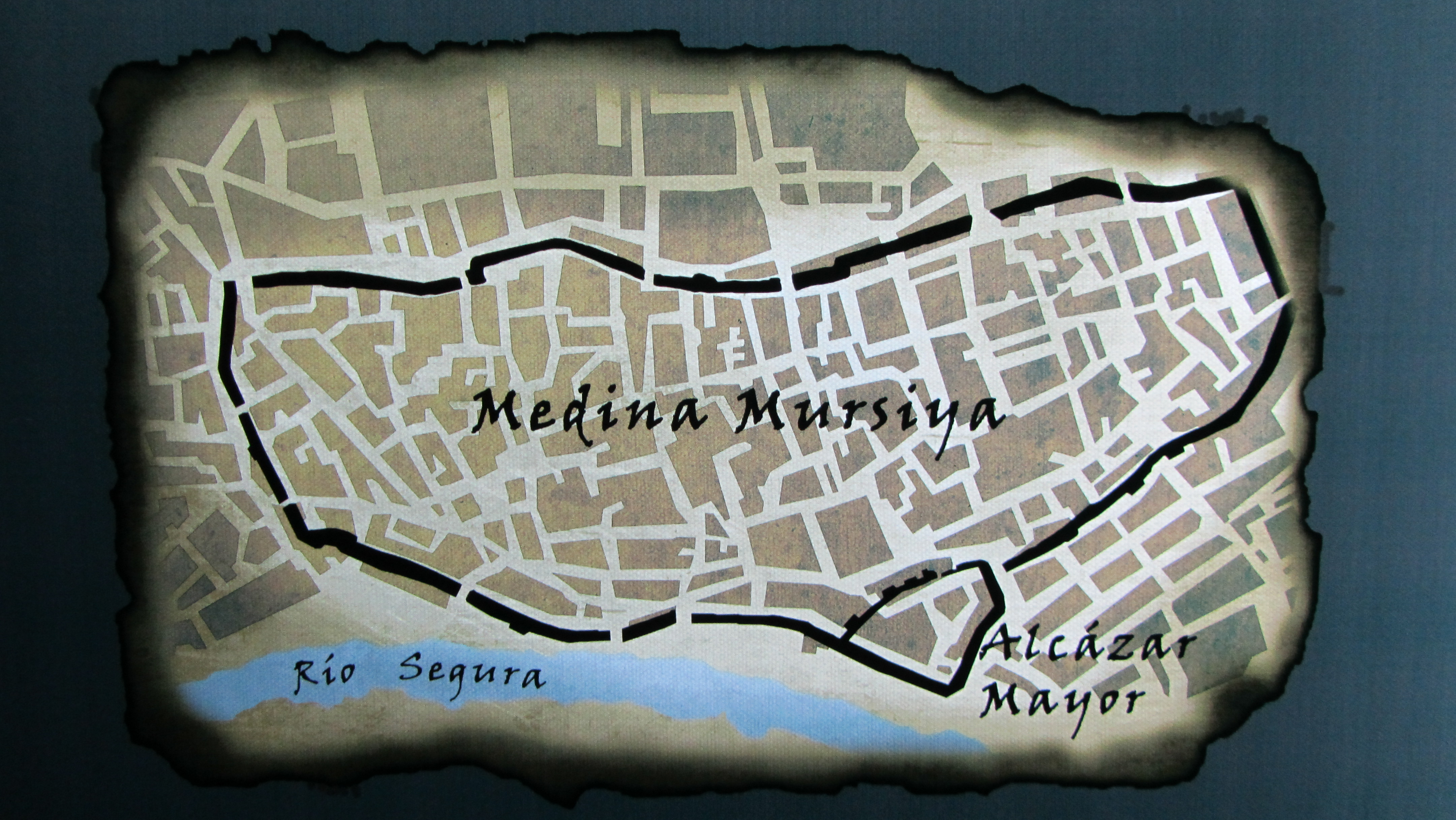 Grafico del la muralla de la medina musulmana de Murcia y el Alcázar Mayor.